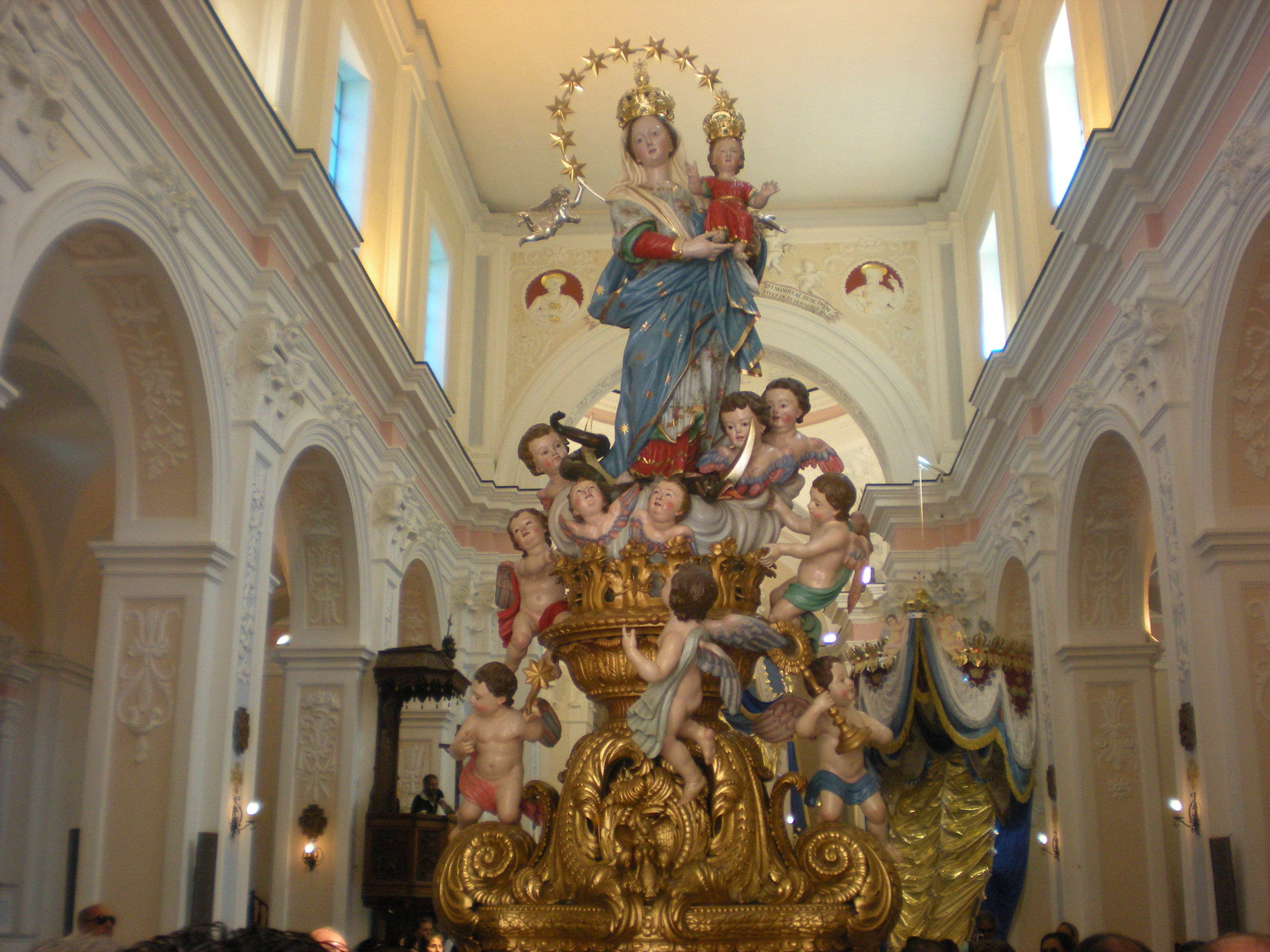 L'effige di Mamma Nostra di Bivongi